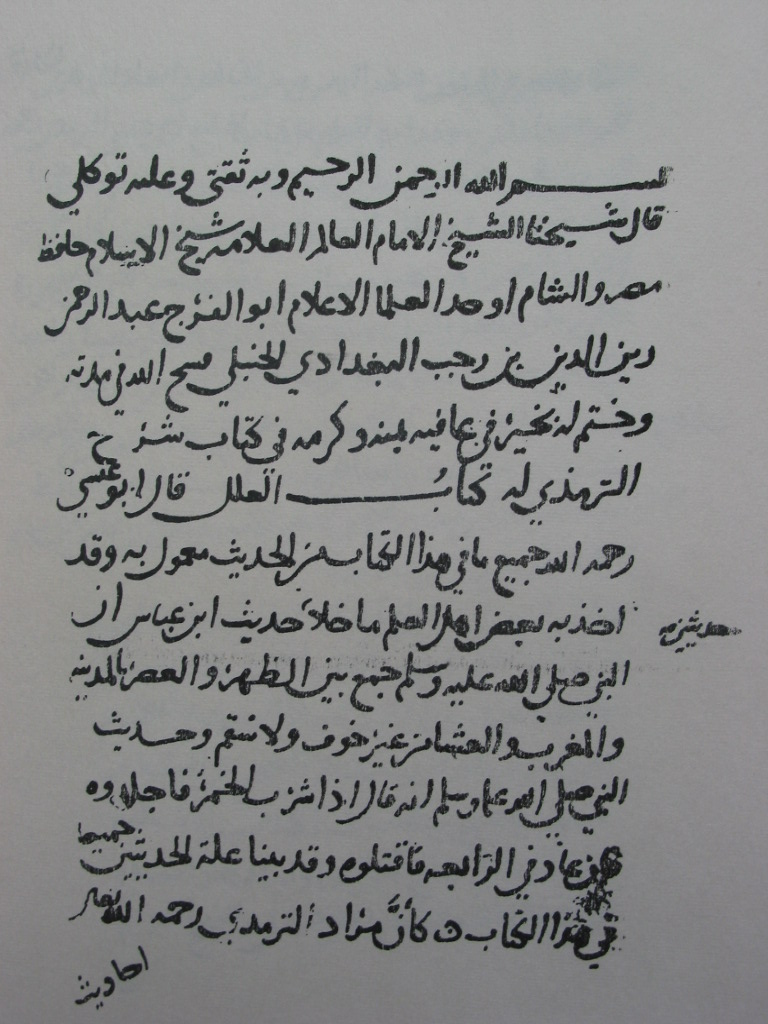 Blatt aus einer arab. Hs aus dem 13. Jahrhundert